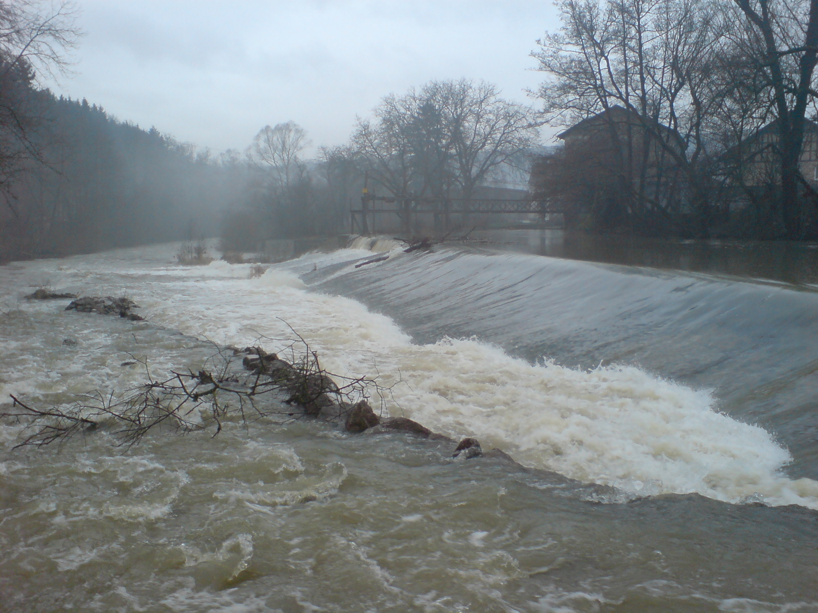 Starke Wasserführung am Ruchsener Wehr. Links die wenige Jahre junge Fischaufstiegshilfe, die die alte, schrottige Fischaufstiegshilfe ersetzt hat.